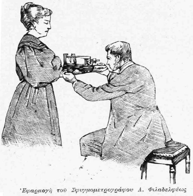 Pulsmessgerät. Griechische Erfindung, 19. Jahrhundert